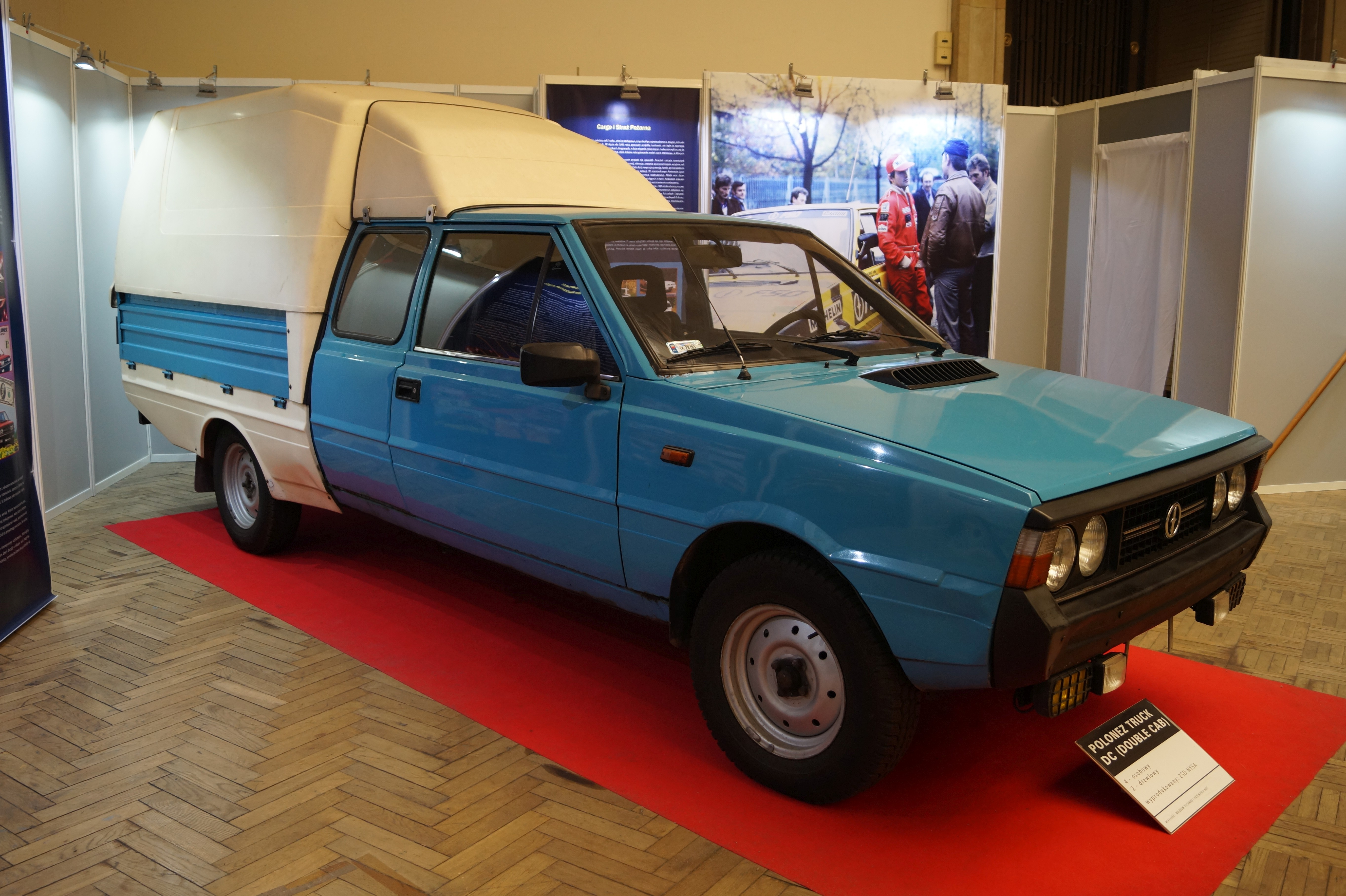 This photo was taken during Automotive Wikiexpedition 2016 set up by Wikimedia Polska Association.You can see all photographs in category Wikiekspedycja motoryzacyjna 2016. English | polski | +/− FSO Polonez Truck DC w Muzeum Nauki i Techniki w Warszawie